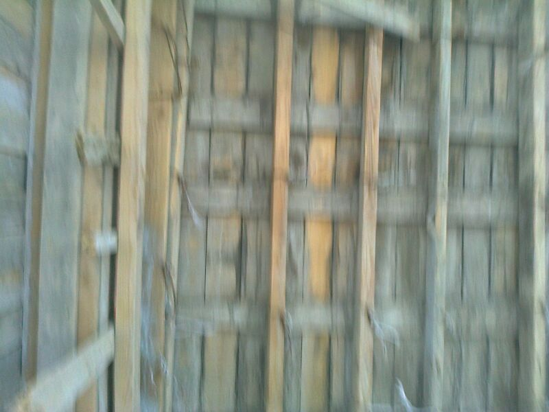 طوبار 6